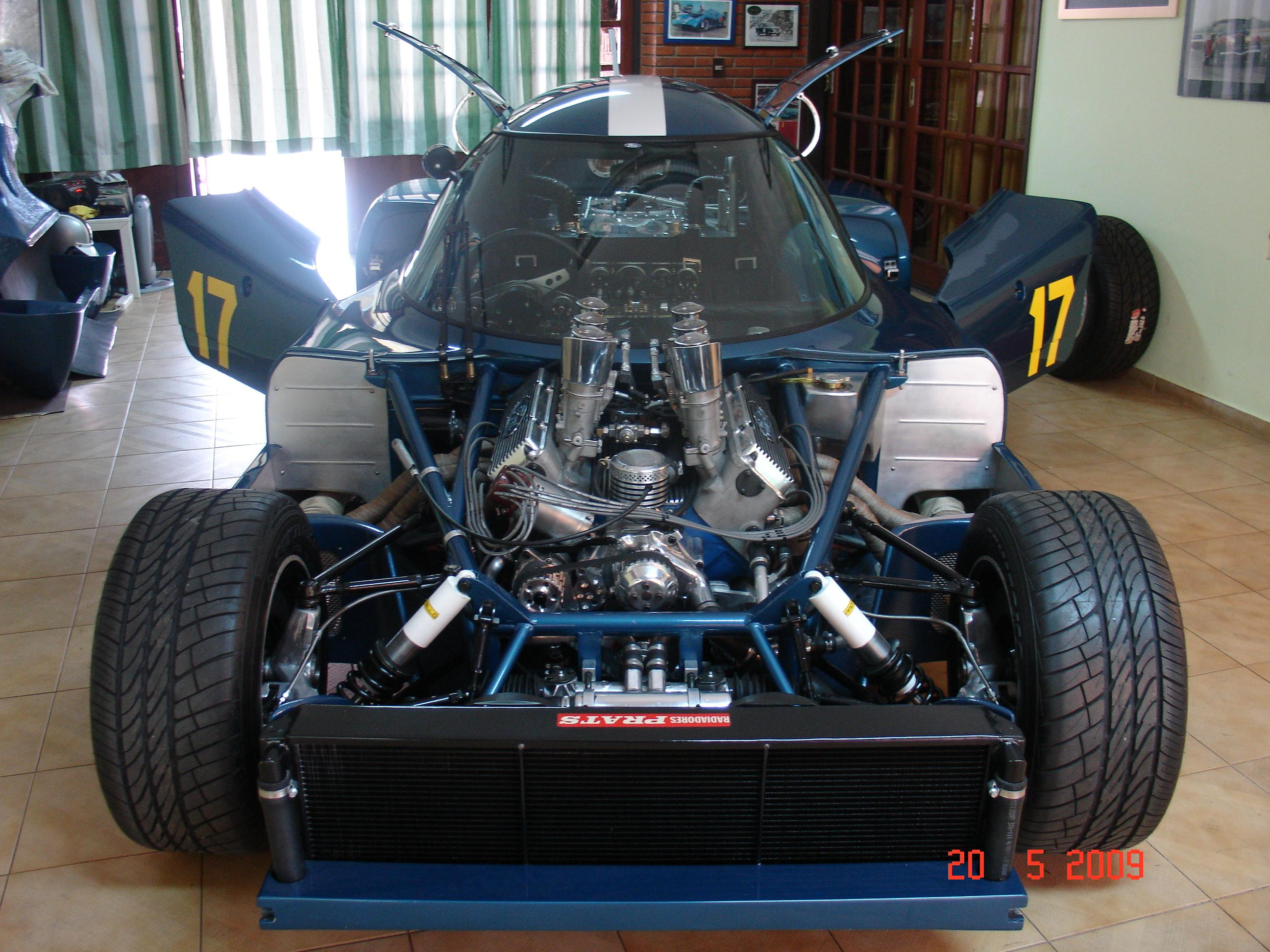 Mecanica del Huayra SP